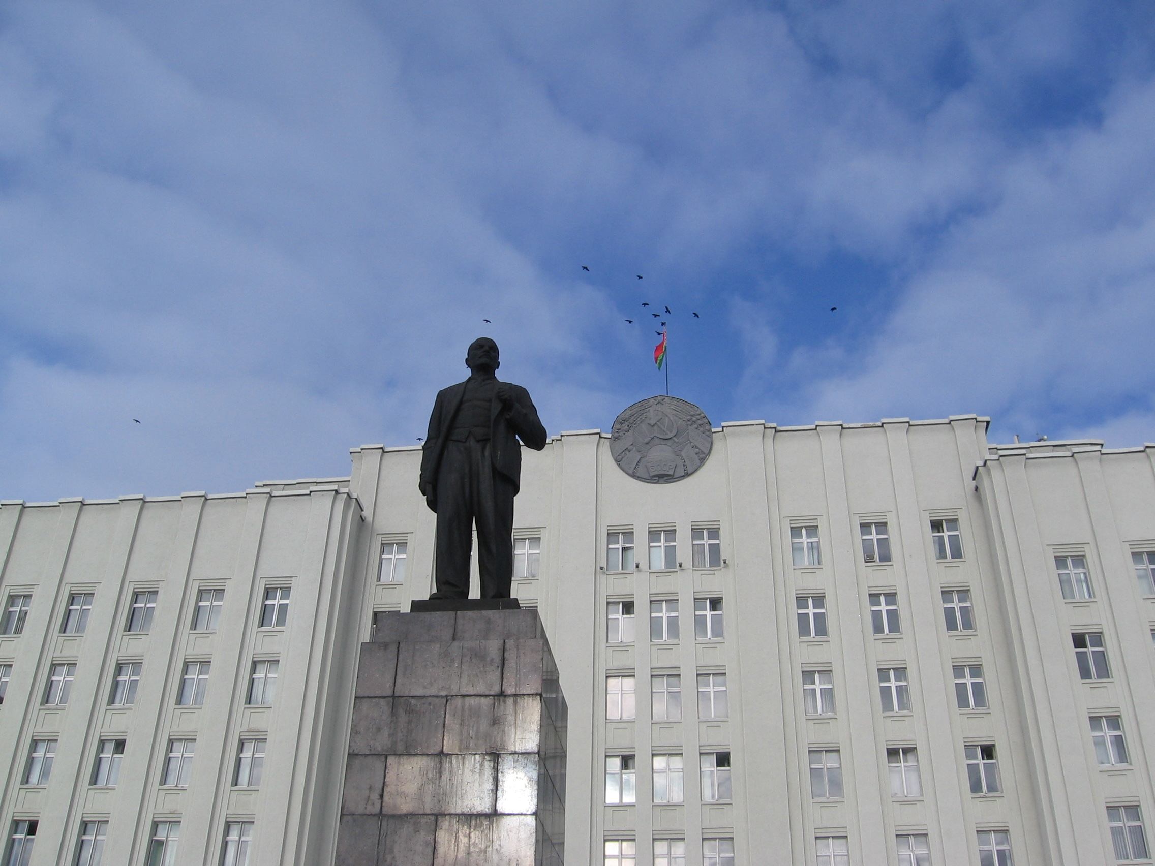 Беларуская (тарашкевіца): Ансамбль плошчы Леніна: Дом Саветаў адміністрацыйны будынак жылыя дамыпомнік У.І. Леніну. г. Магілёў This is a photo of Belarusian heritage monument. Reference number: 513Г000039 ( WLM)